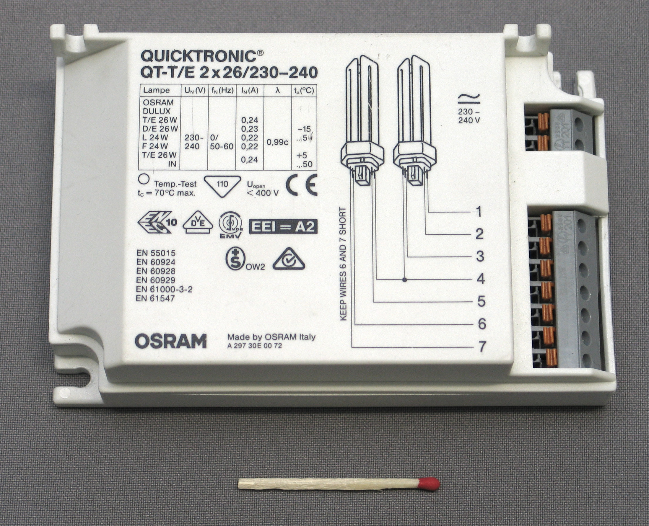 Elektronisches Vorschaltgerät für den Betrieb von zwei Kompakt-Leuchtstofflampen mit je 26 W